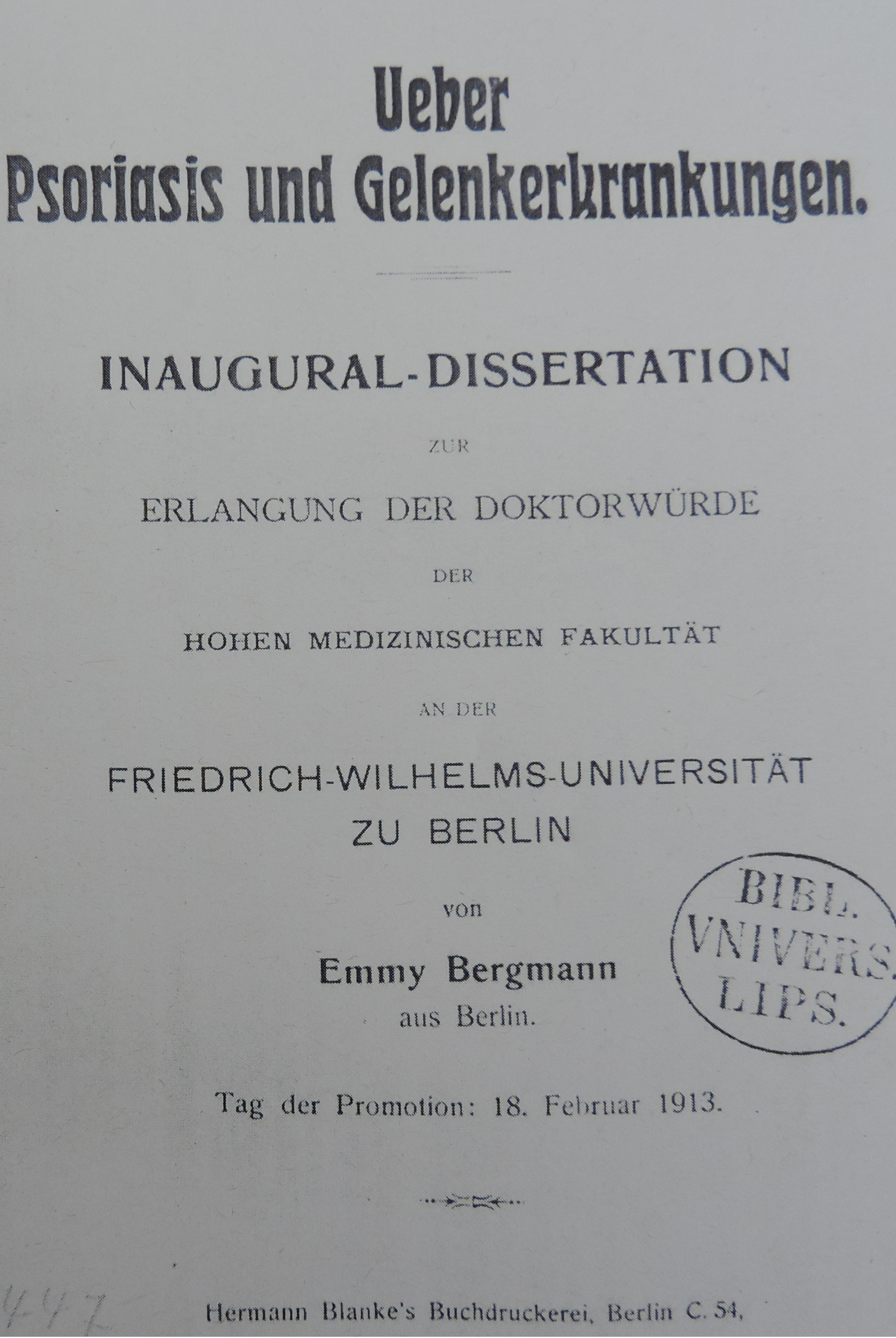 Dissertation Emmy Bergmannb